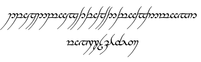 Avañe'ẽ: es